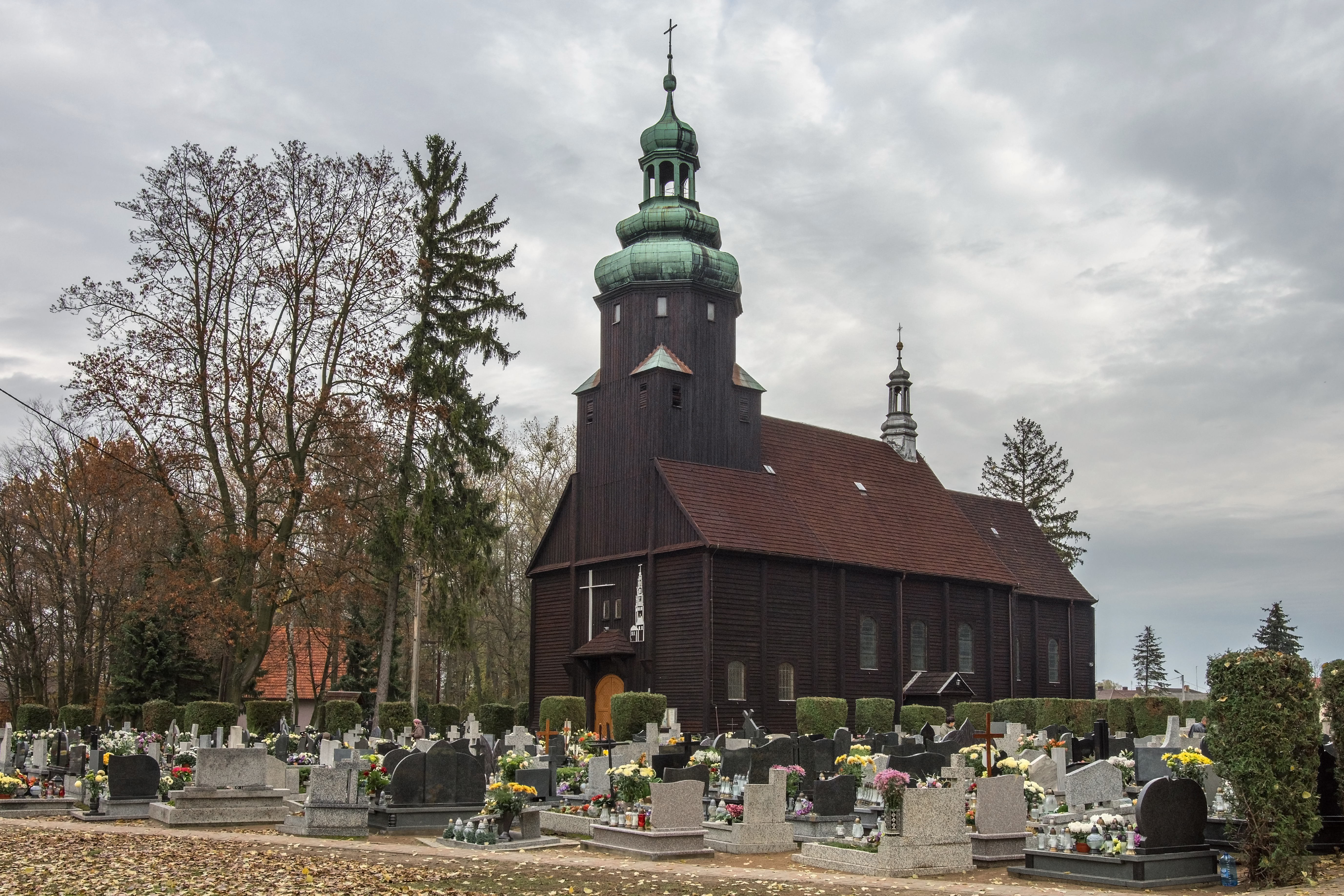 Odolanów, kościół cmentarny, ob. par. p.w. św. Barbary, 1784, 1928